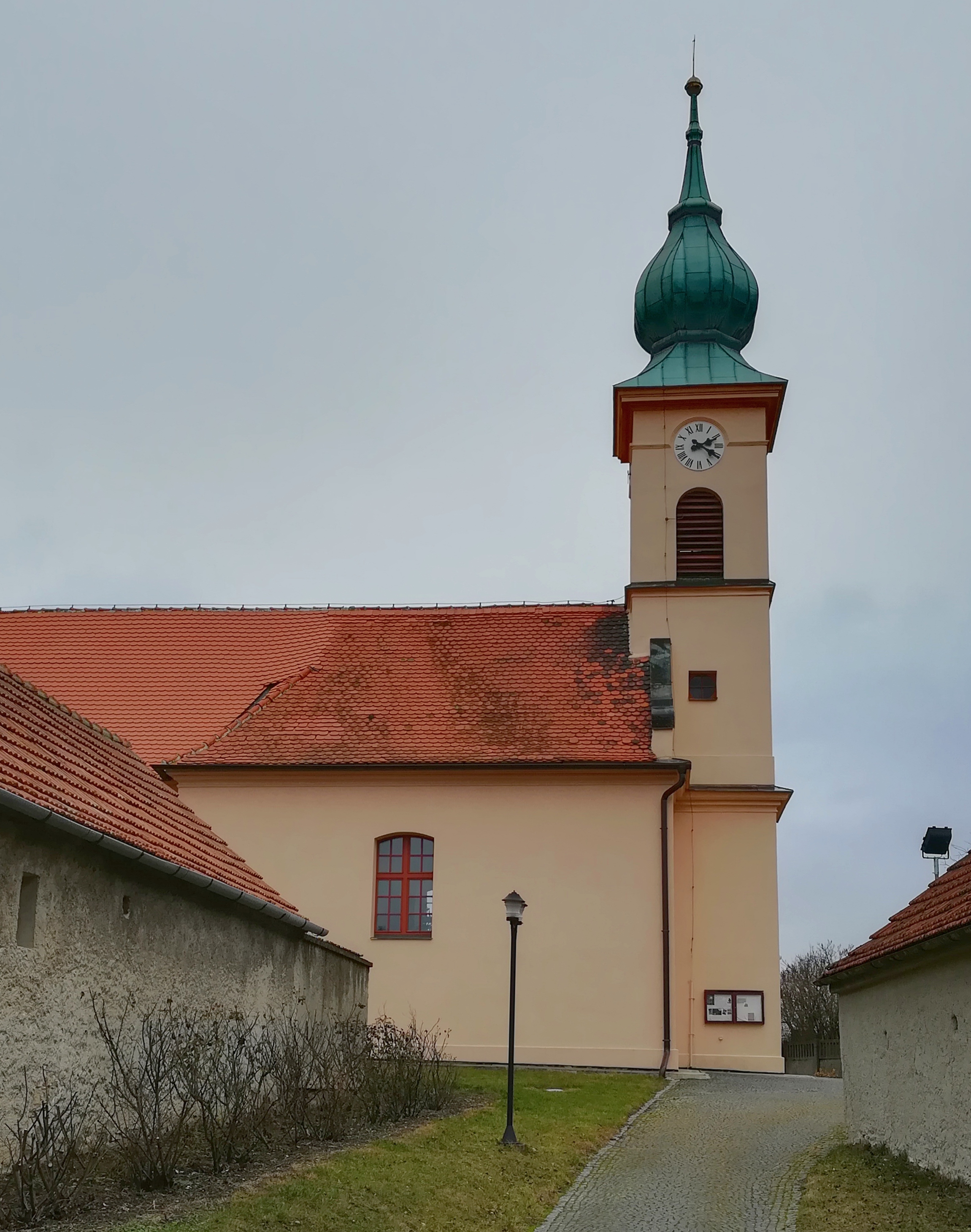 Ketkovice - kostel svaté Kateřiny, pohled od severu